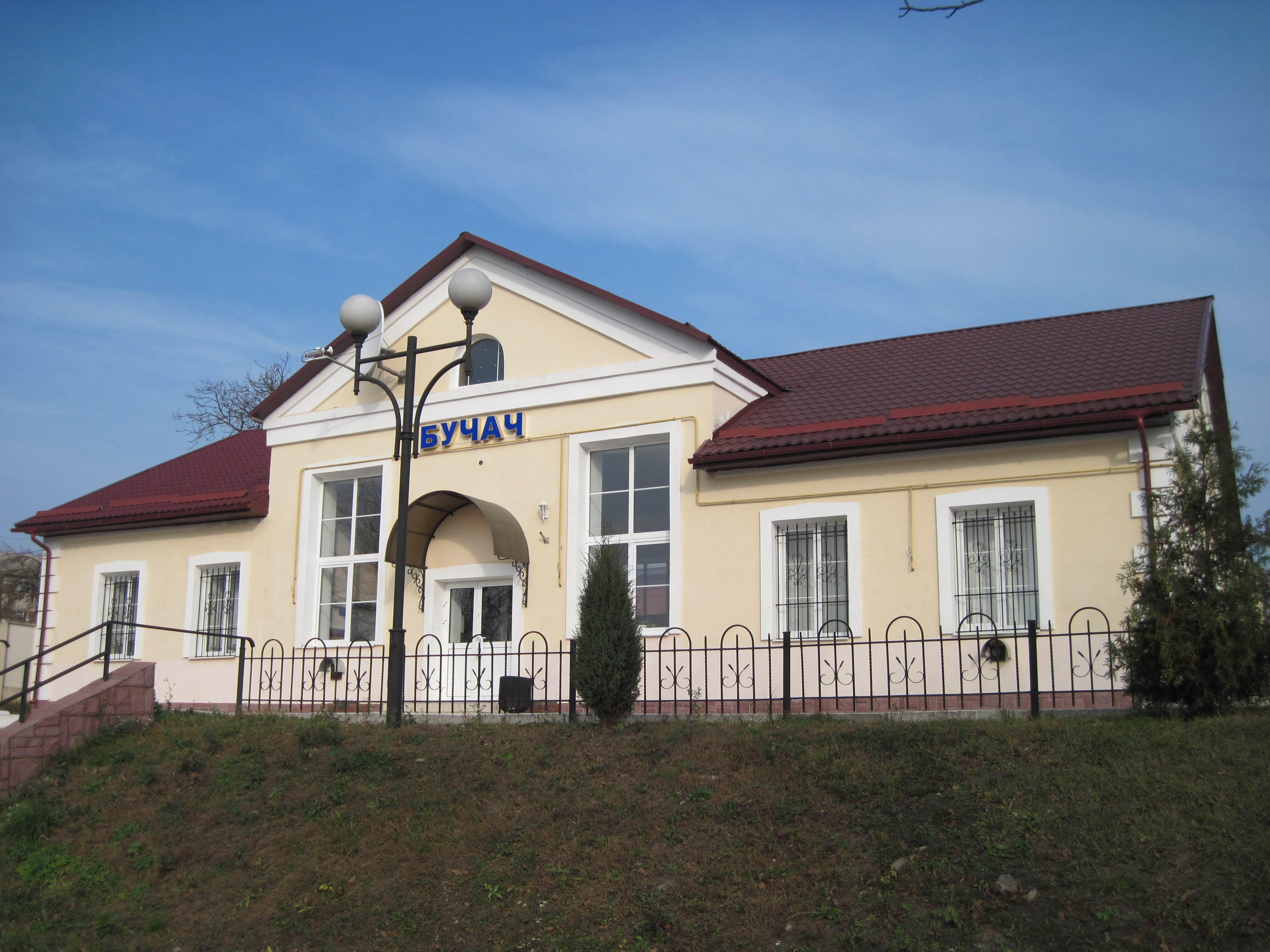 Залізнична станція Бучач. Осінь 2013